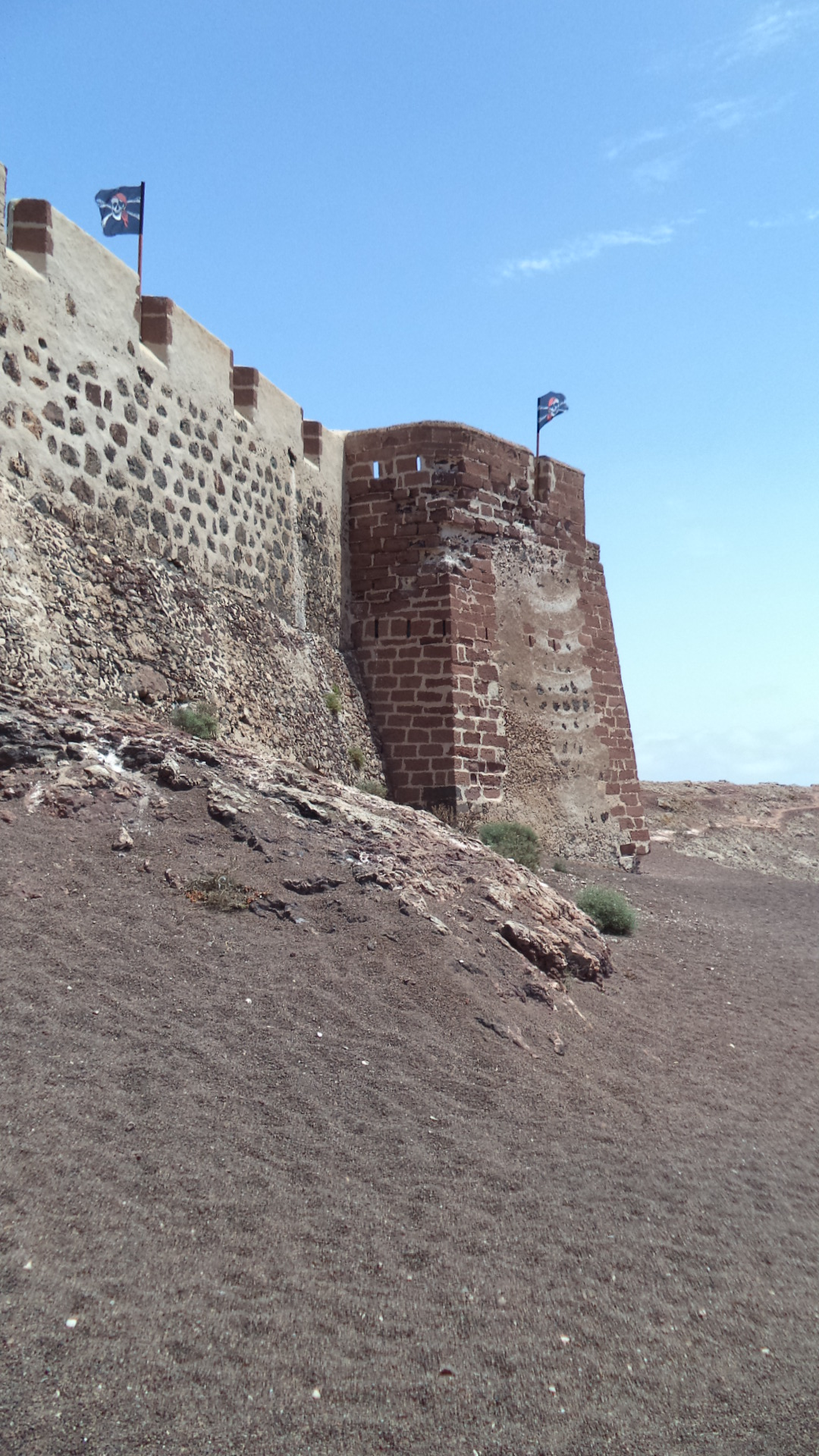 Castillo de Santa Bárbara de Teguise. Desde 2011 alberga el Museo de la Piratería, que es un centro de interpretación de los piratas y corsarios que han estado relacionados con la historia de Canarias